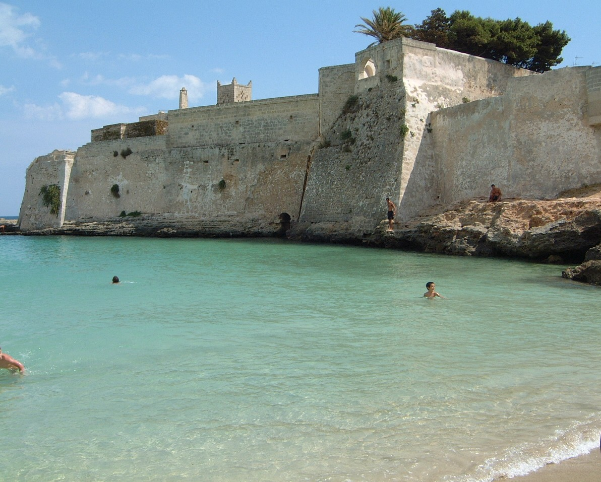 Immagine della "caletta" a lato nord dell'Abbazia Santo Stefano. La piccola spiaggia è chiamata dai Monopolitani "Porto Ghiacciolo" per via delle correnti di acqua gelida presenti.